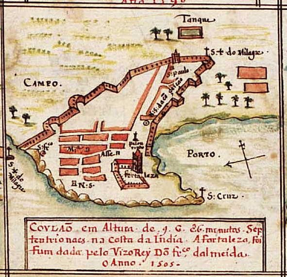 Kollam (Quilon) in Kerala, Indien, im 16. Jahrhundert